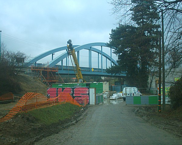 Pont de Neuville, Neuville-sur-Oise on 03/03/06.